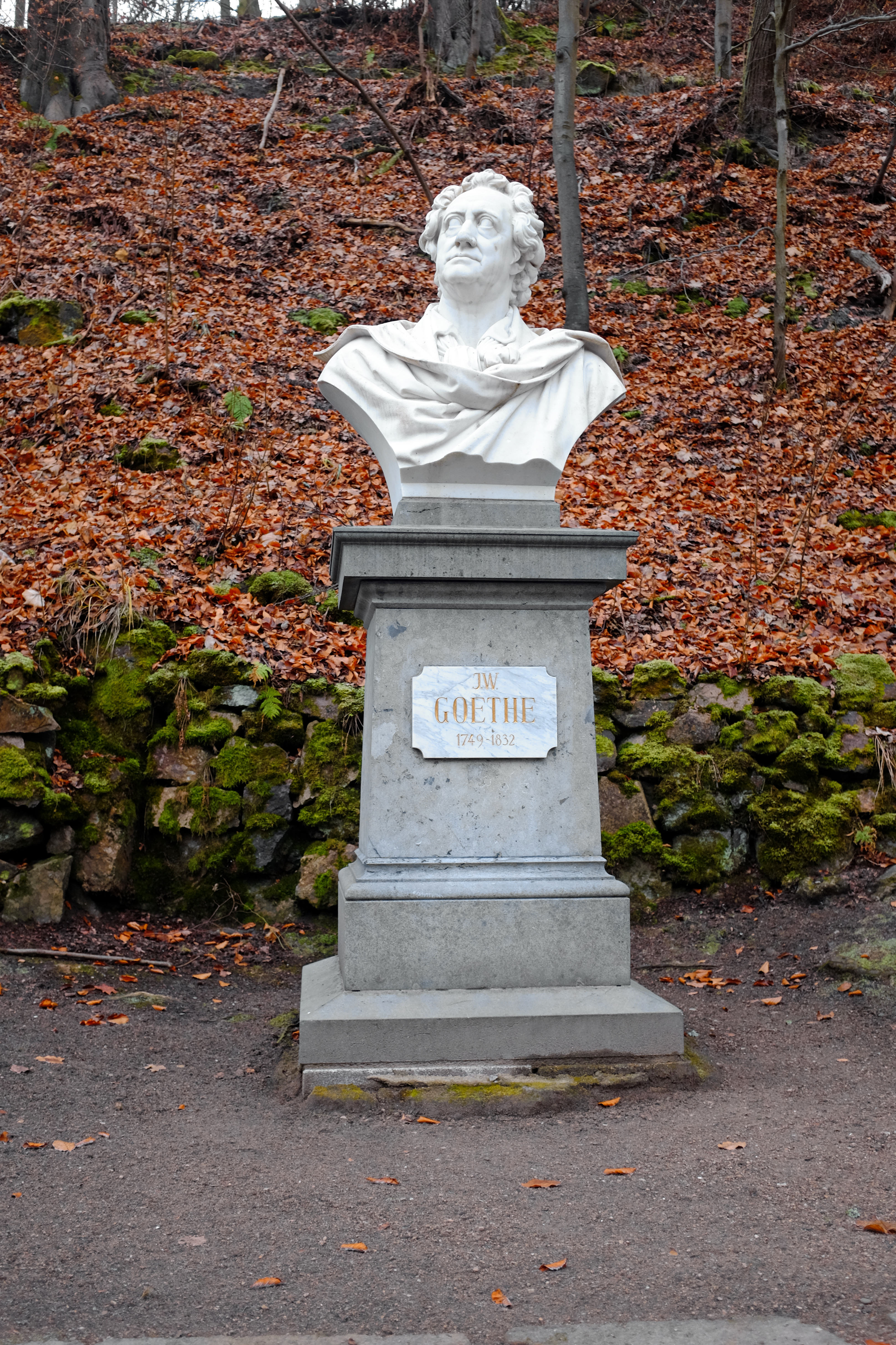 Busta J. W. Goetha, Goethova stezka, parc. 781/1, Karlovy Vary.